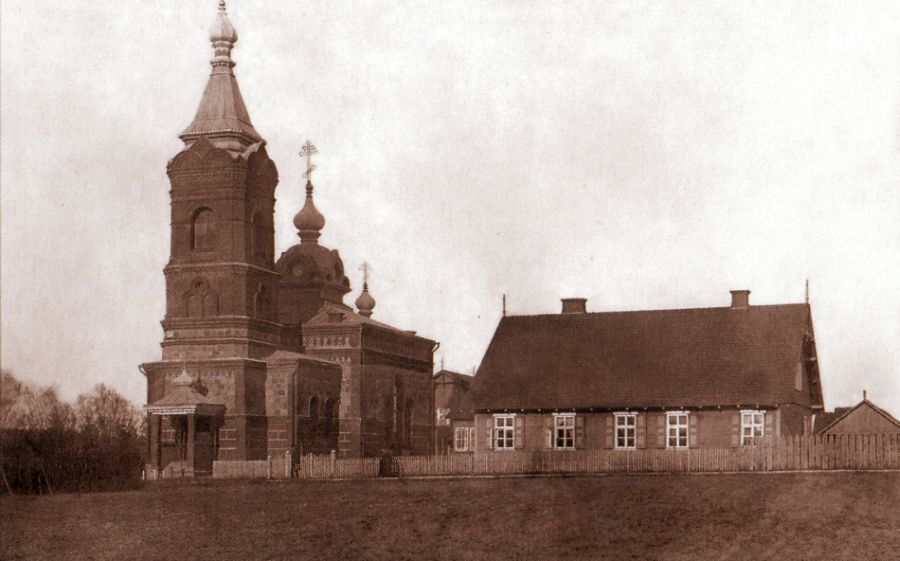 Tõrva Kirik-Kammersaal umbes 1915. aastal. Foto on ilmunud Hillar-Jüri Villemsoni raamatus "Tõrva vanadel fotodel" (2006).